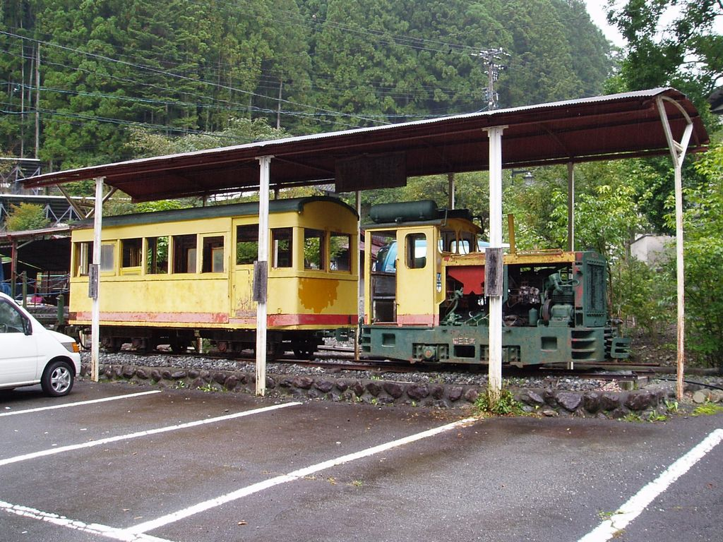 Senzu Log hauling Railload. 寸又峡温泉に保存されている千頭森林鉄道の車両 機関車は協三工業製・客車は岩崎レール製 あまり状態はよくない。 2007.10.10 Photo by Cassiopeia_sweet.